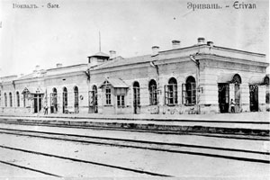 Станция Эривань Закавказской железной дороги